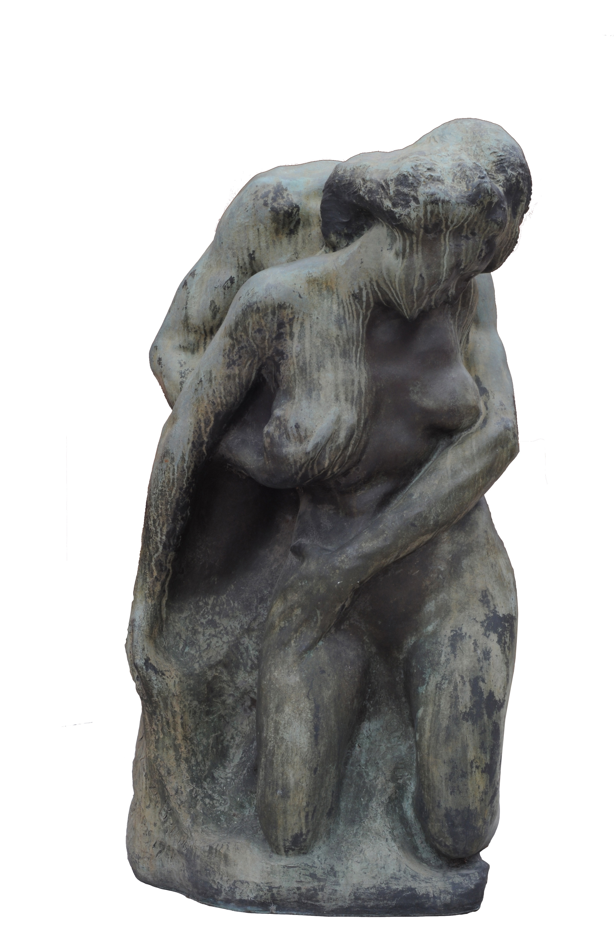 Pedro Zonza Briano, Creced y multiplicaos. 1911. 134 x 66 x 75 cm, bronce. Inv. 3599.